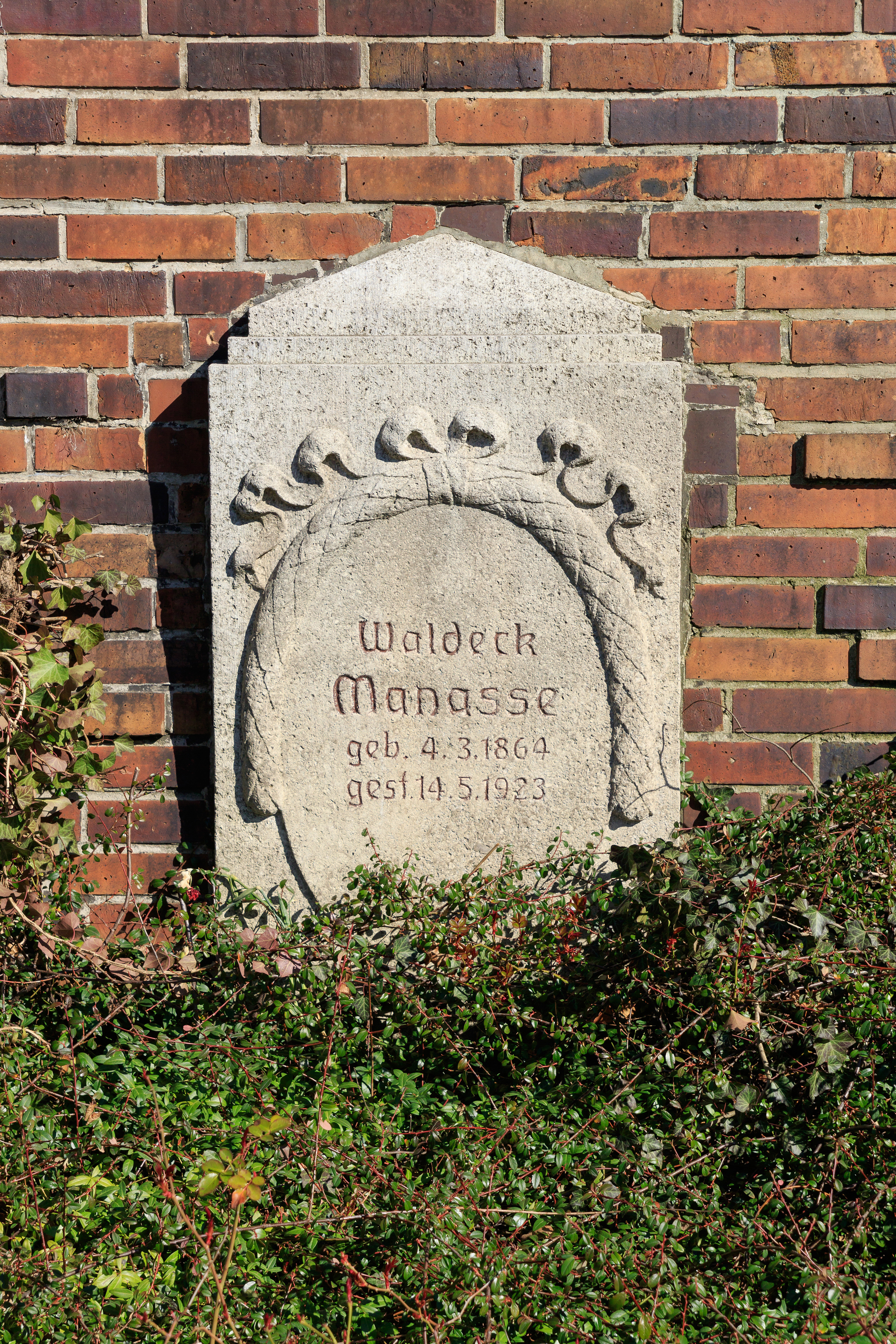 Zentralfriedhof Friedrichsfelde, Berlin-Lichtenberg. Gedenkstätte der Sozialisten, Grab von Waldeck Manasse.